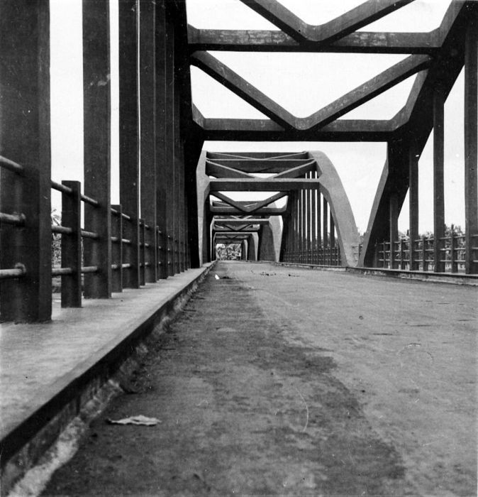 Repronegatief. De Rawalo-brug bij Banjoemas, Midden-Java